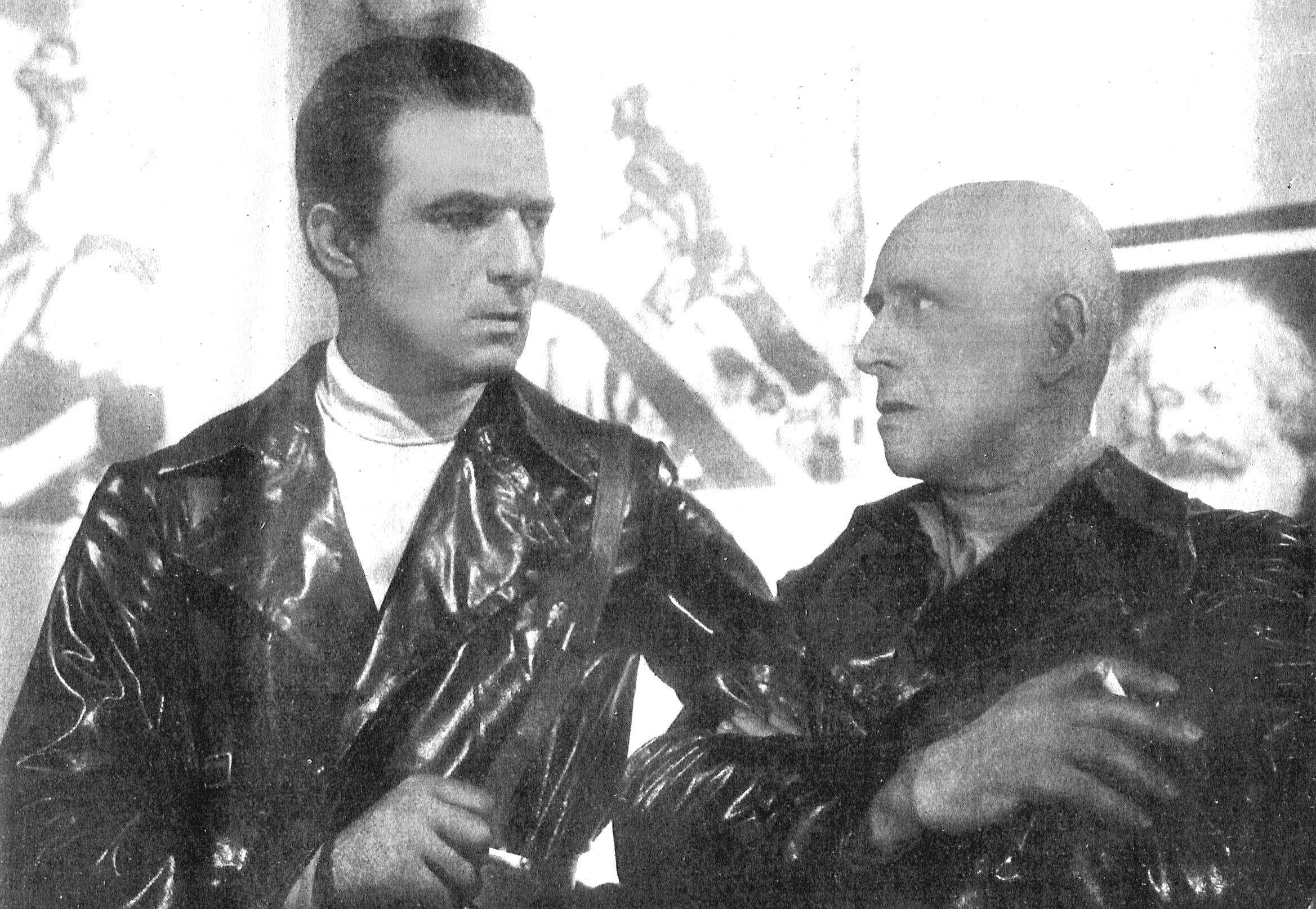 Fosco Giachetti e Lamberto Picasso in "noi vivi addio kira" (Alessandrini 1942)